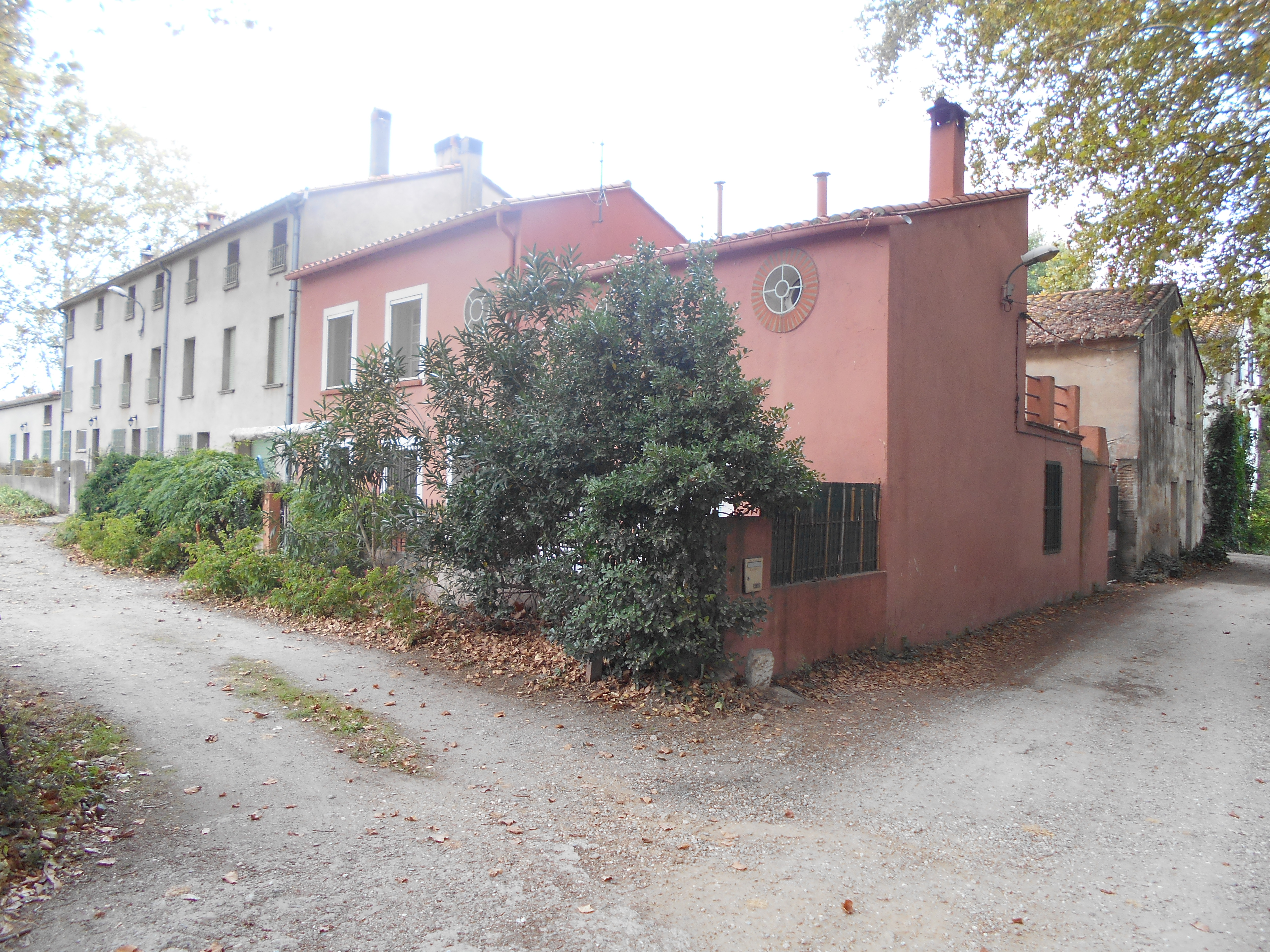 Cabanes, Sant Genís de Fontanes